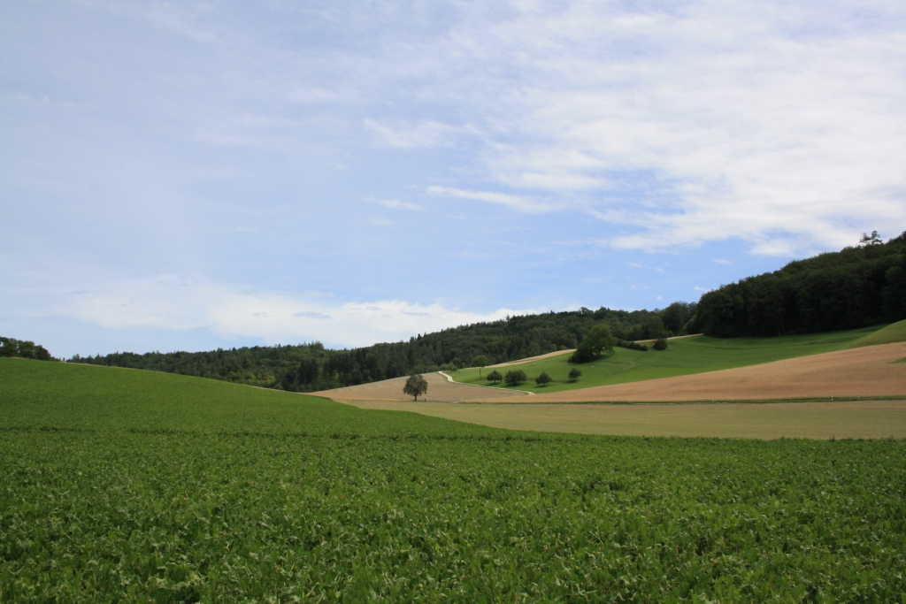 Egliswil